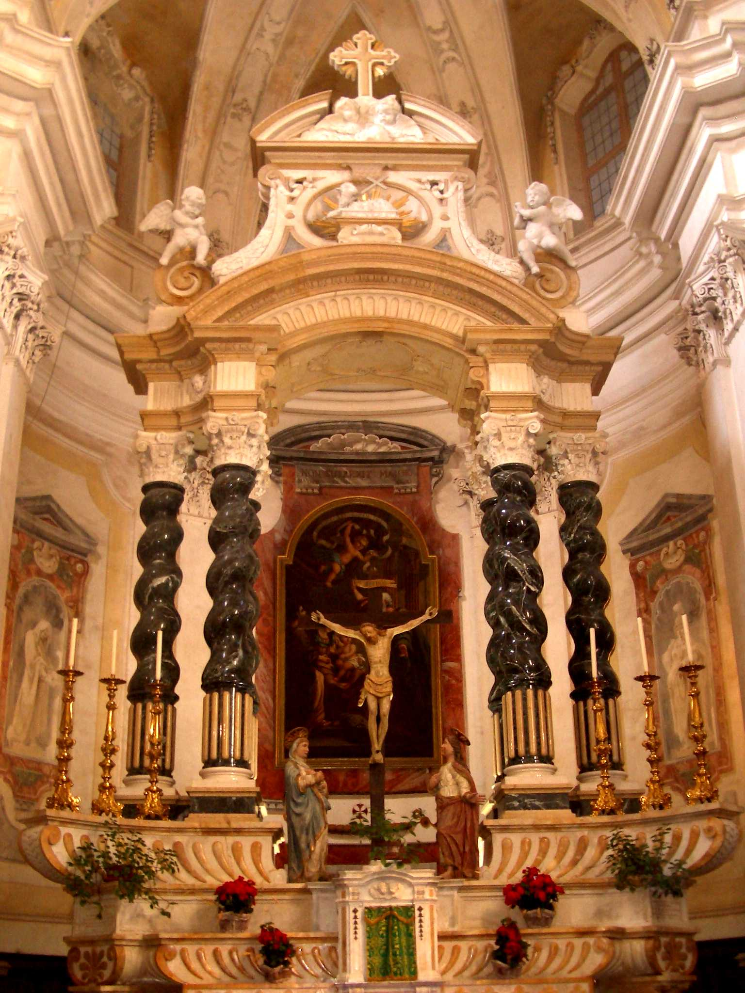 Santuario di San Giovanni d'Andorno, View of the altar, Campiglia Cervo (Biella), Italy